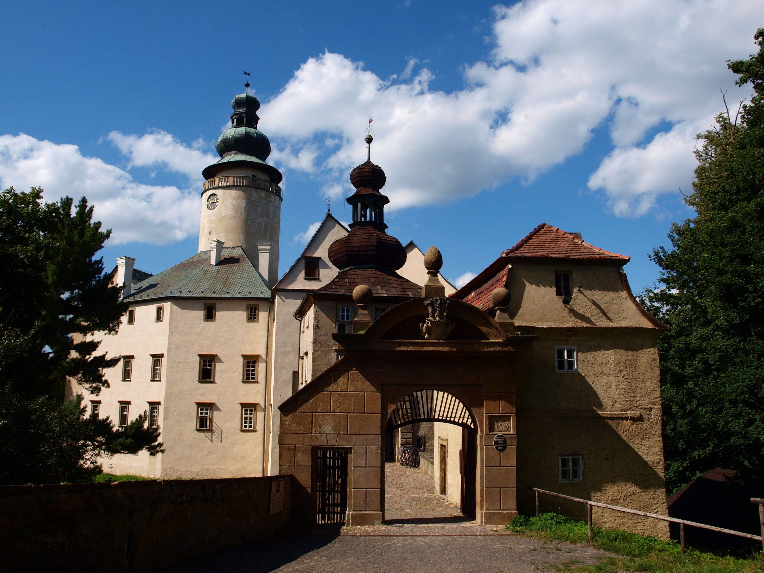 Zámek Lemberk